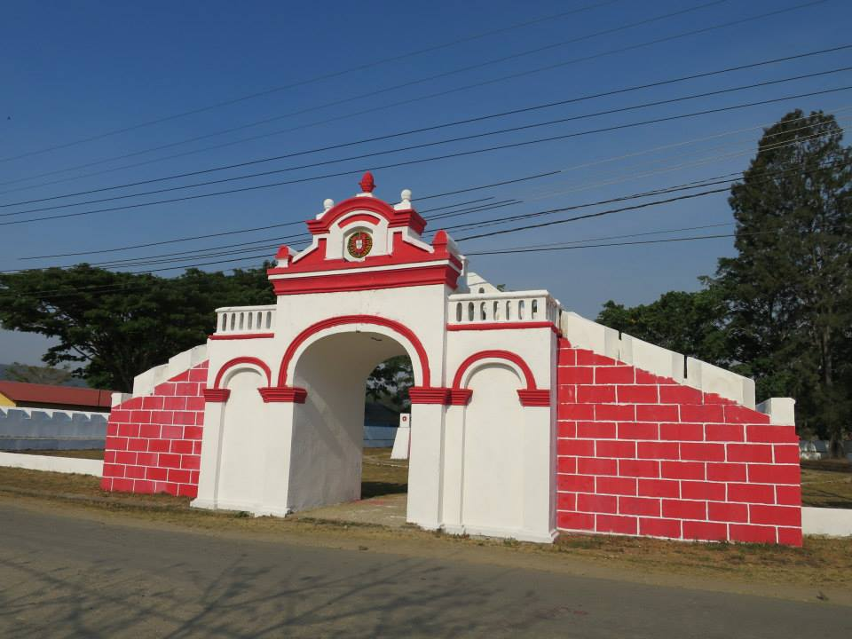 Gedenkstätte an die Opfer der japanischen Besatzung in Aileu